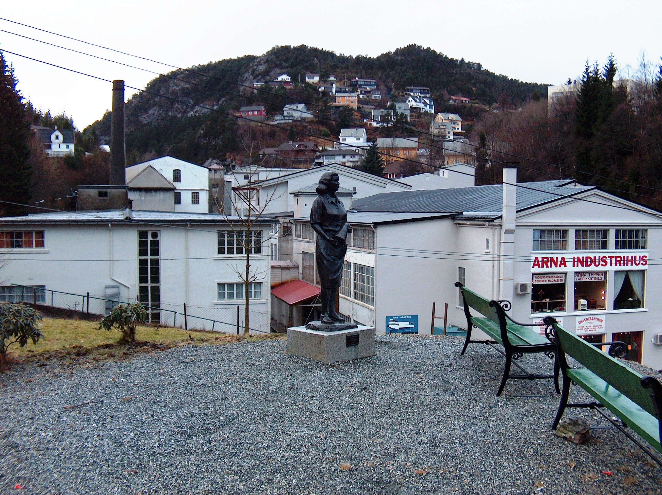 Arna Industrihus